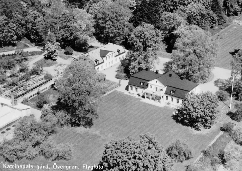 Flygfoto över Katrinedals gård, Katrinedal, Övergrans socken, Uppland 1955